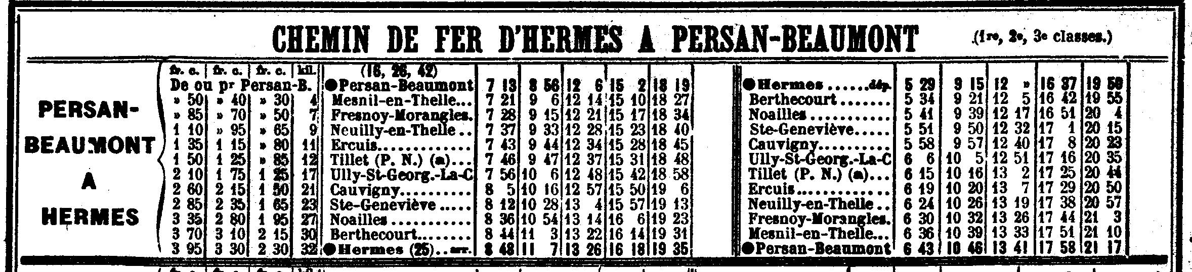 Livret Chaix de mai 1914 : Horaires de la ligne de chemin de fer Hermes à Beaumont